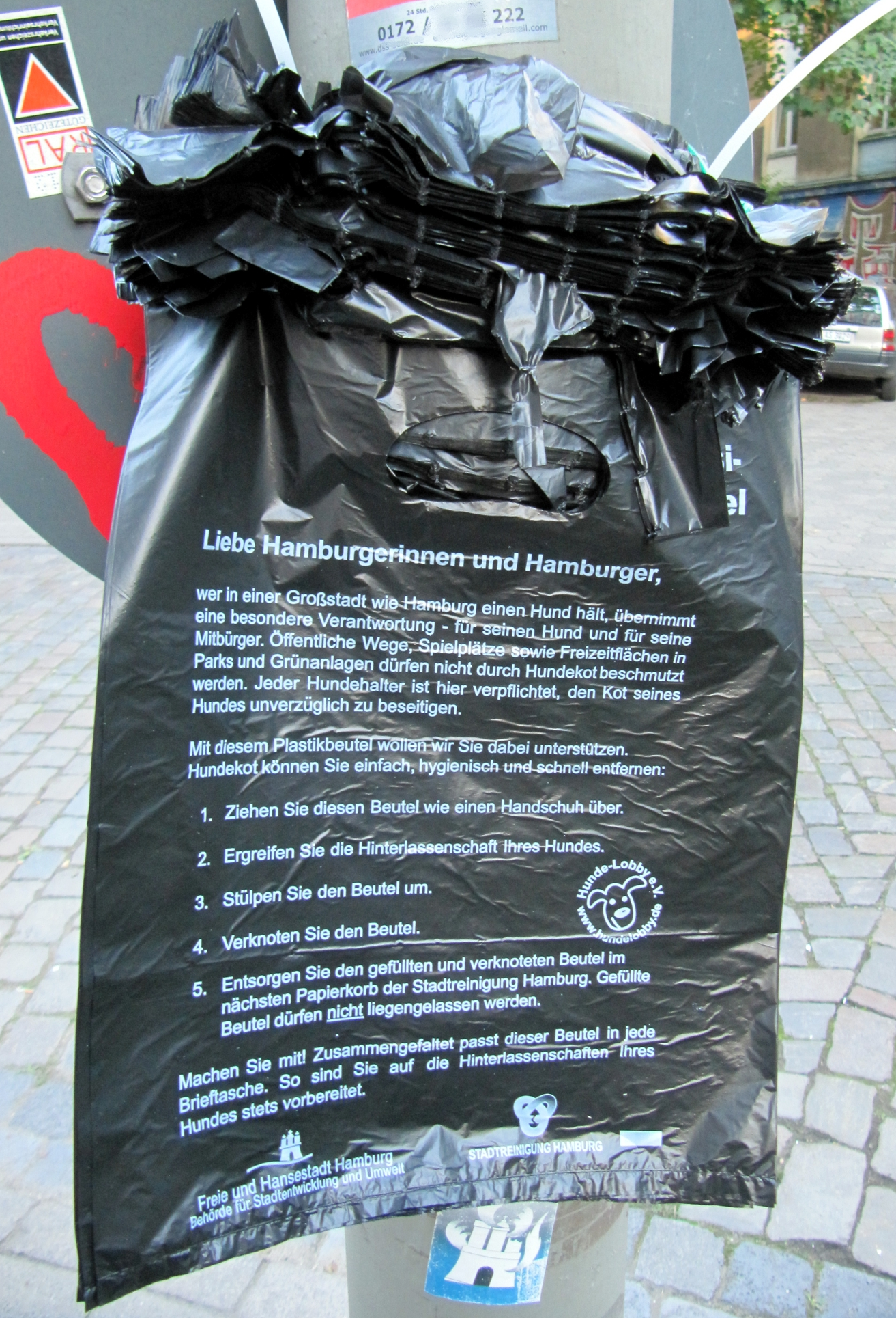 Hundekotbeutel in Hamburg mit aufgedruckter Anleitung (August 2016)